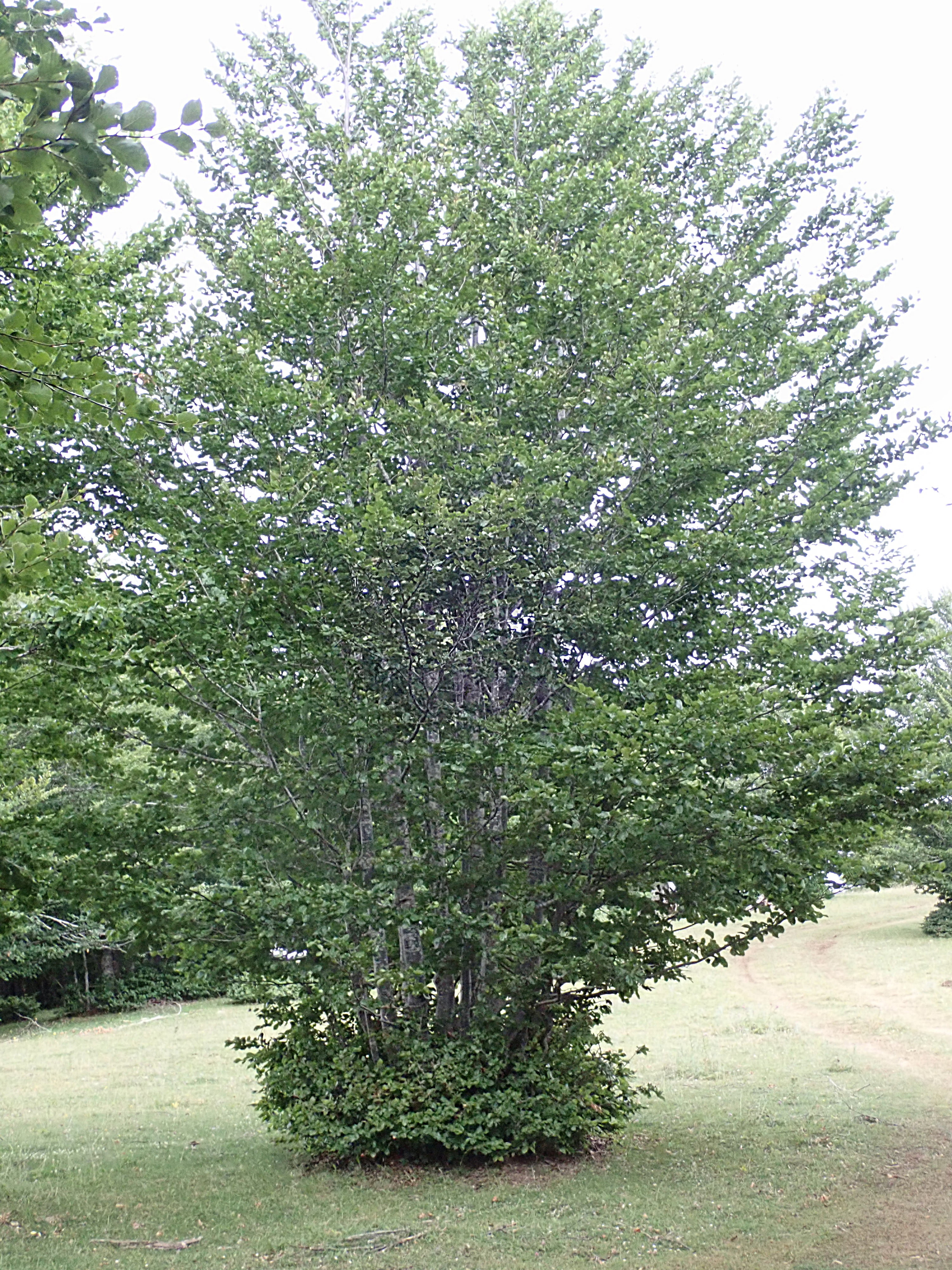 Gruppe von jungen Rotbuchen, am Fuß durch Verbiss im Wachstum beschränkt